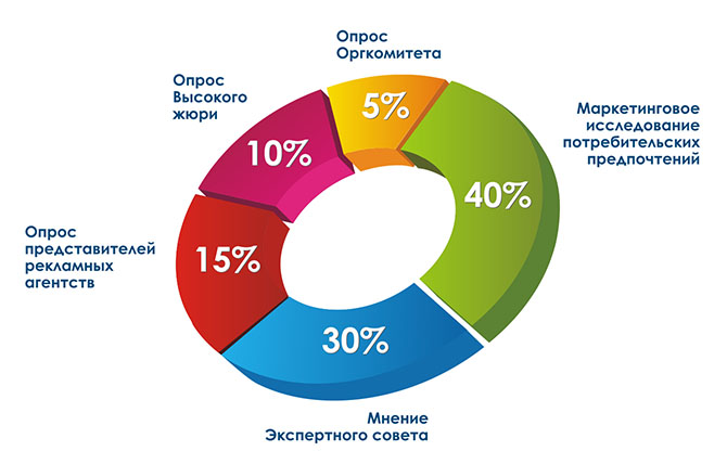 Диаграмма, отображающая методику определения победителей.